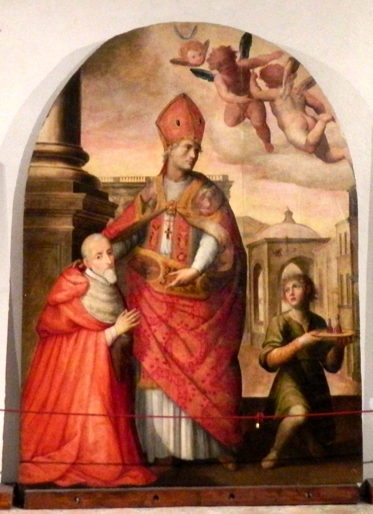 San Gennaro con il cardinale Alfonso Gesualdo di Giovanni Balducci - Museo diocesano di Napoli